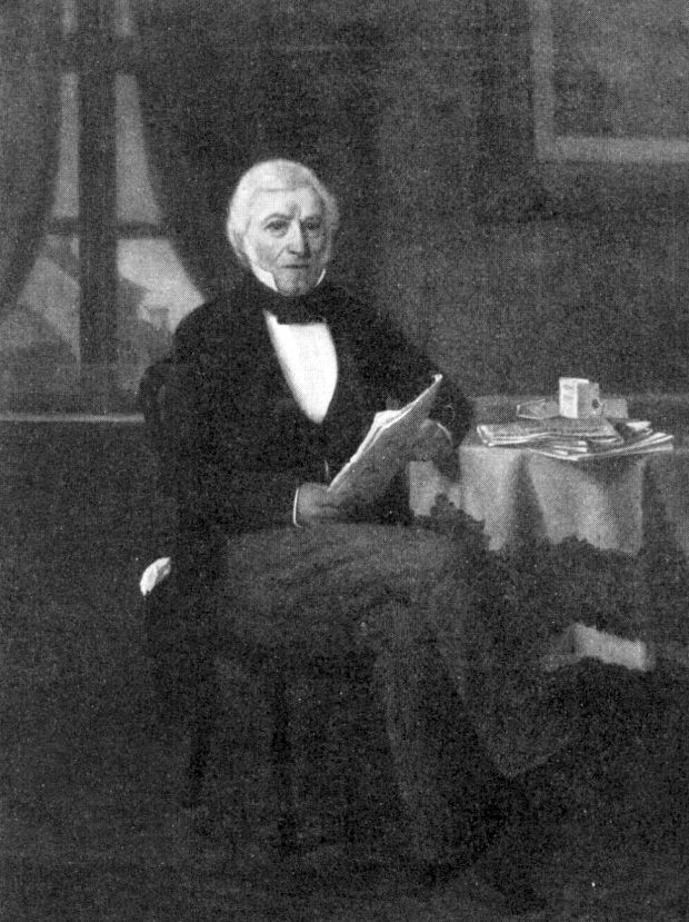 Mendel Elias Delbanco (1780-1862). Vitt hår, svart rock, grå byxor, vit bordduk med guldbård, röda gardiner.